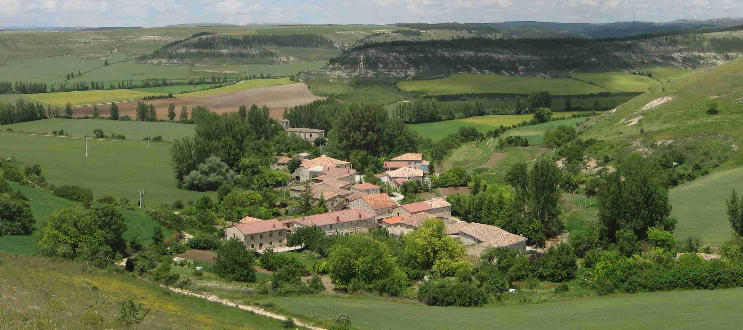 Vista general de Borcos, barrio de Las Hormazas (Burgos)